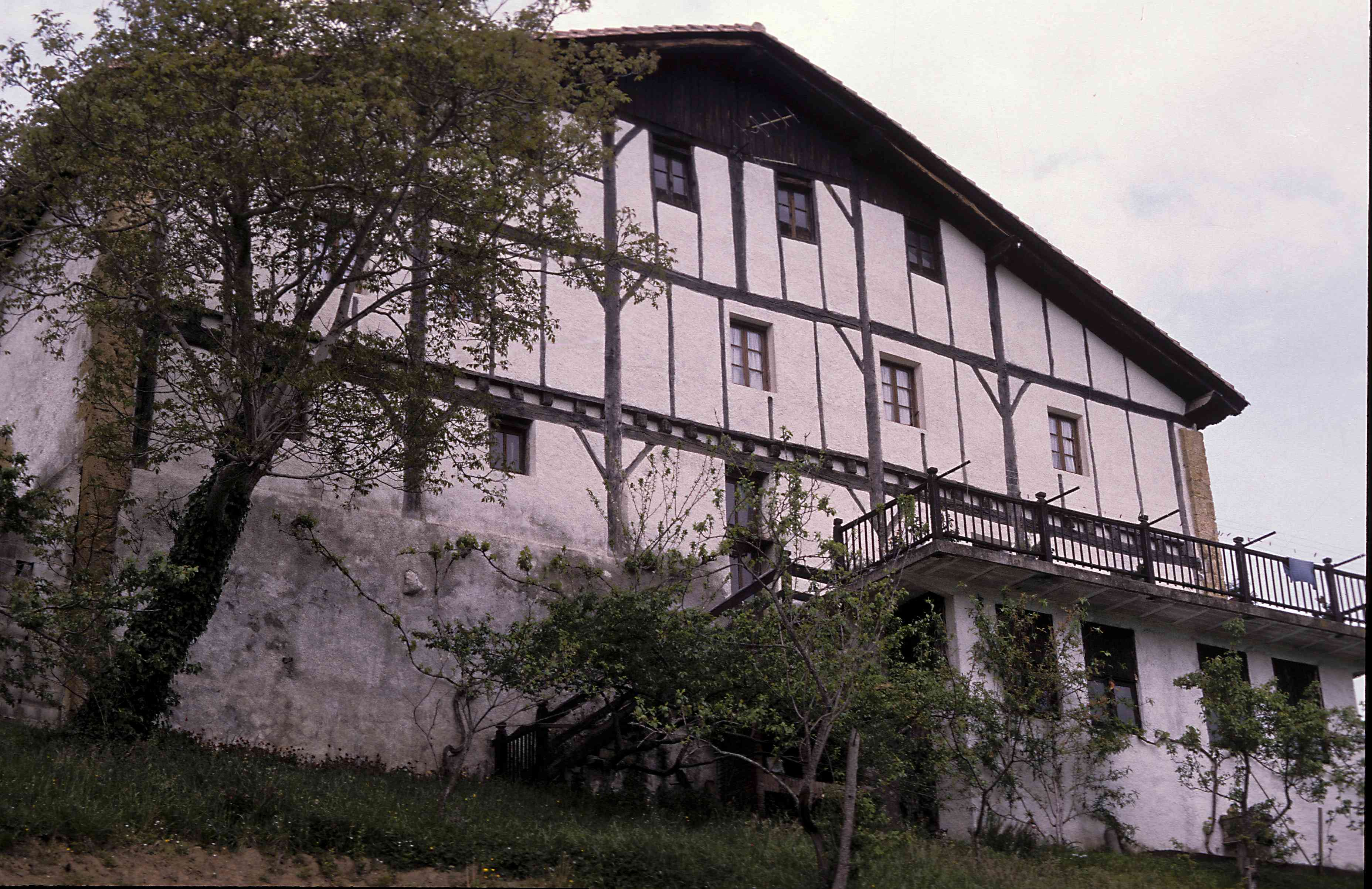 Sorarrain baserria (Larraul, Gipuzkoa), 1988an